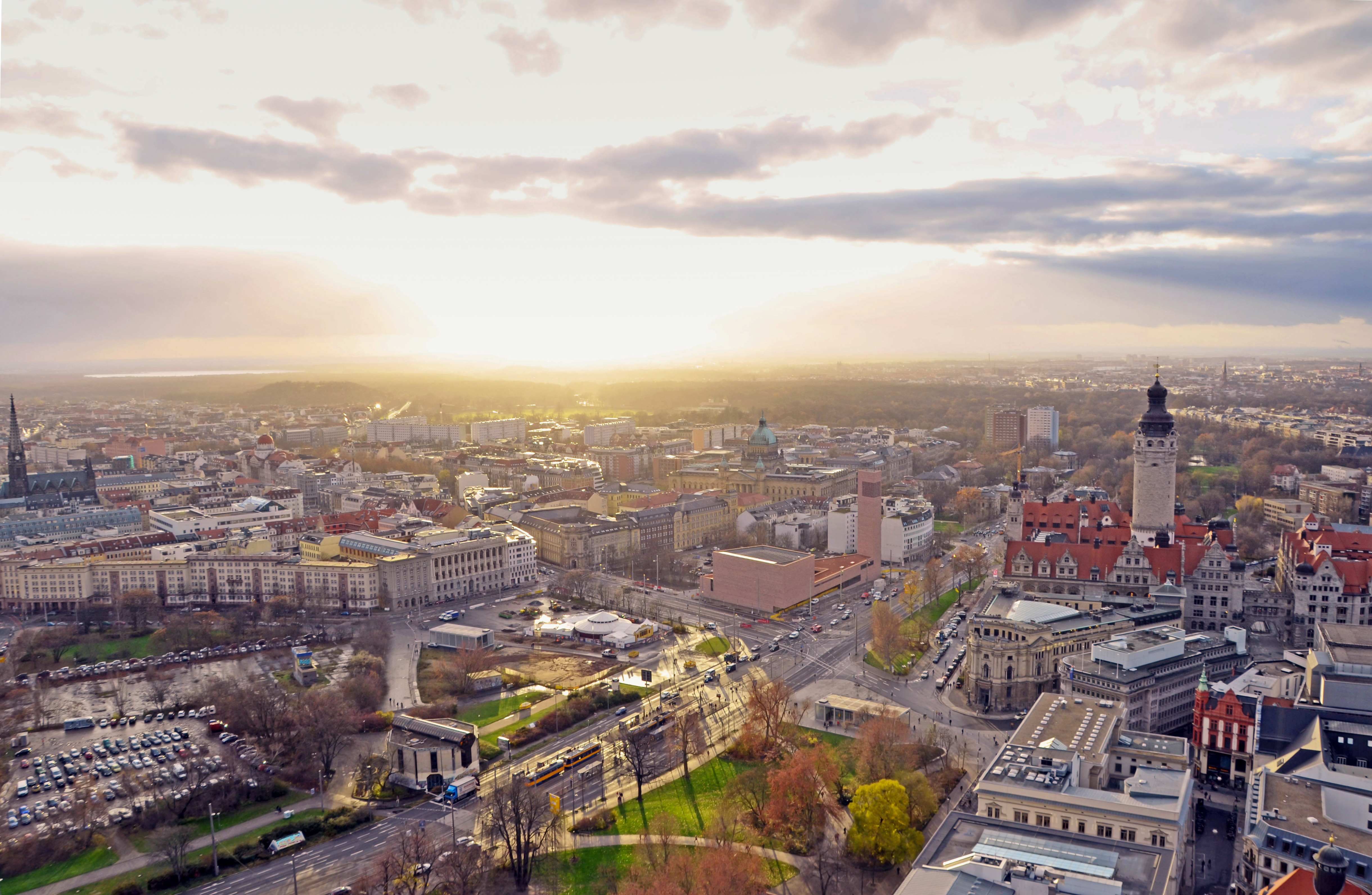 Blick vom Dach des City-Hochhauses. Auf der rechten Seite befindet sich das Neue Rathaus, links daneben die neu gebaute Kirche St. Trinitatis. Im Hintergrund erkennt man das Bundesverwaltungsgericht und den Leipziger Auwald mit dem Fockeberg sowie am Horizont der Cospudener See.